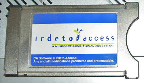 Conditional Access Module voor Irdeto